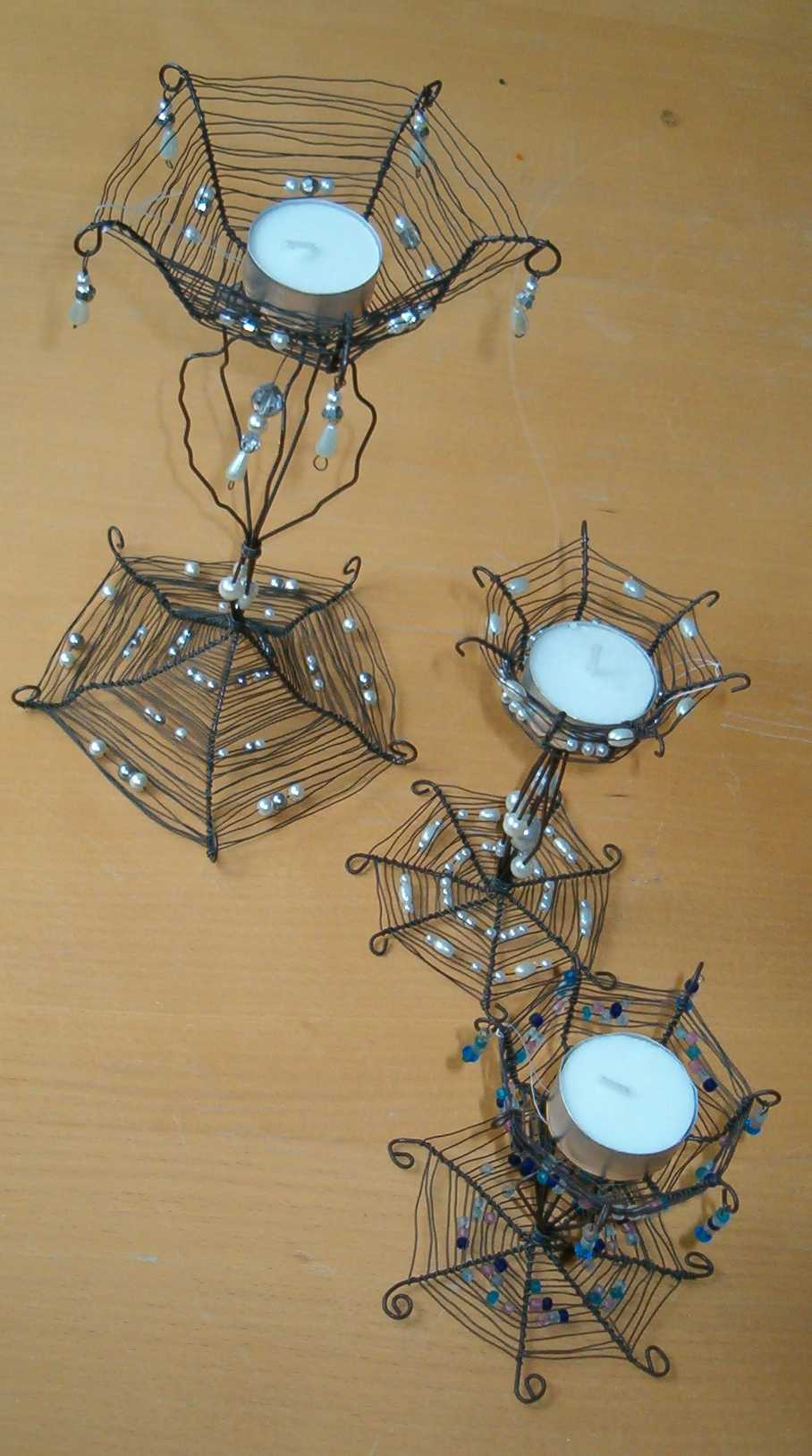 Tre lysestager lavet som luffarslöjd, men pyntet med perler, hvad luffarne ikke gjorde.